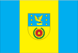 Прапор смт. Вільча (Вовчанський район)